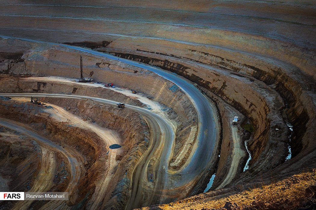 معدن سنگ آهن گل گهر